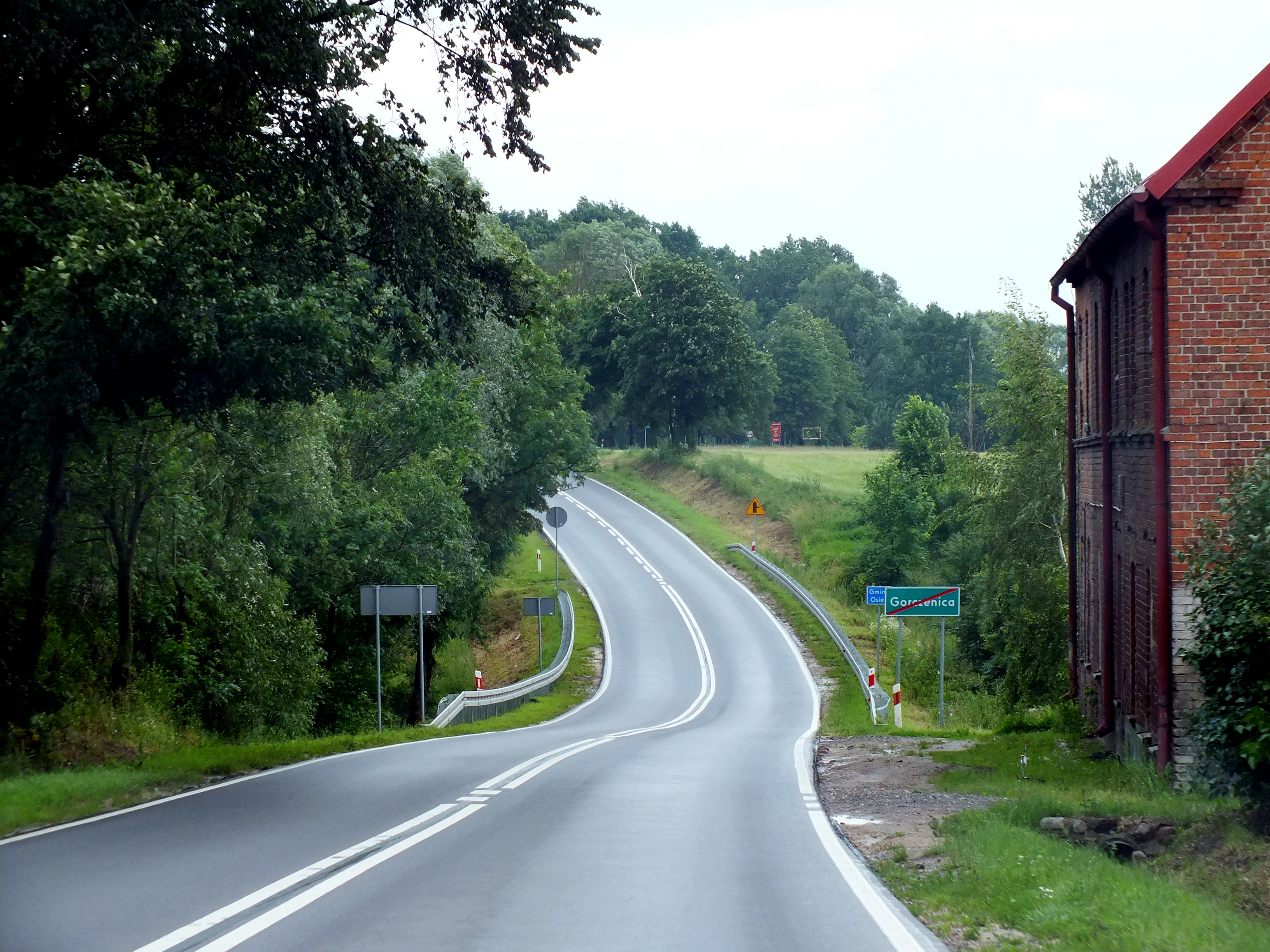 Dawna granica zaborów pruskiego i rosyjskiego w Gorczenicy.